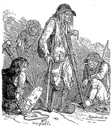 Mendiants bretons vers 1854 (dessin de Penguilly, Les Français peints par eux-mêmes)